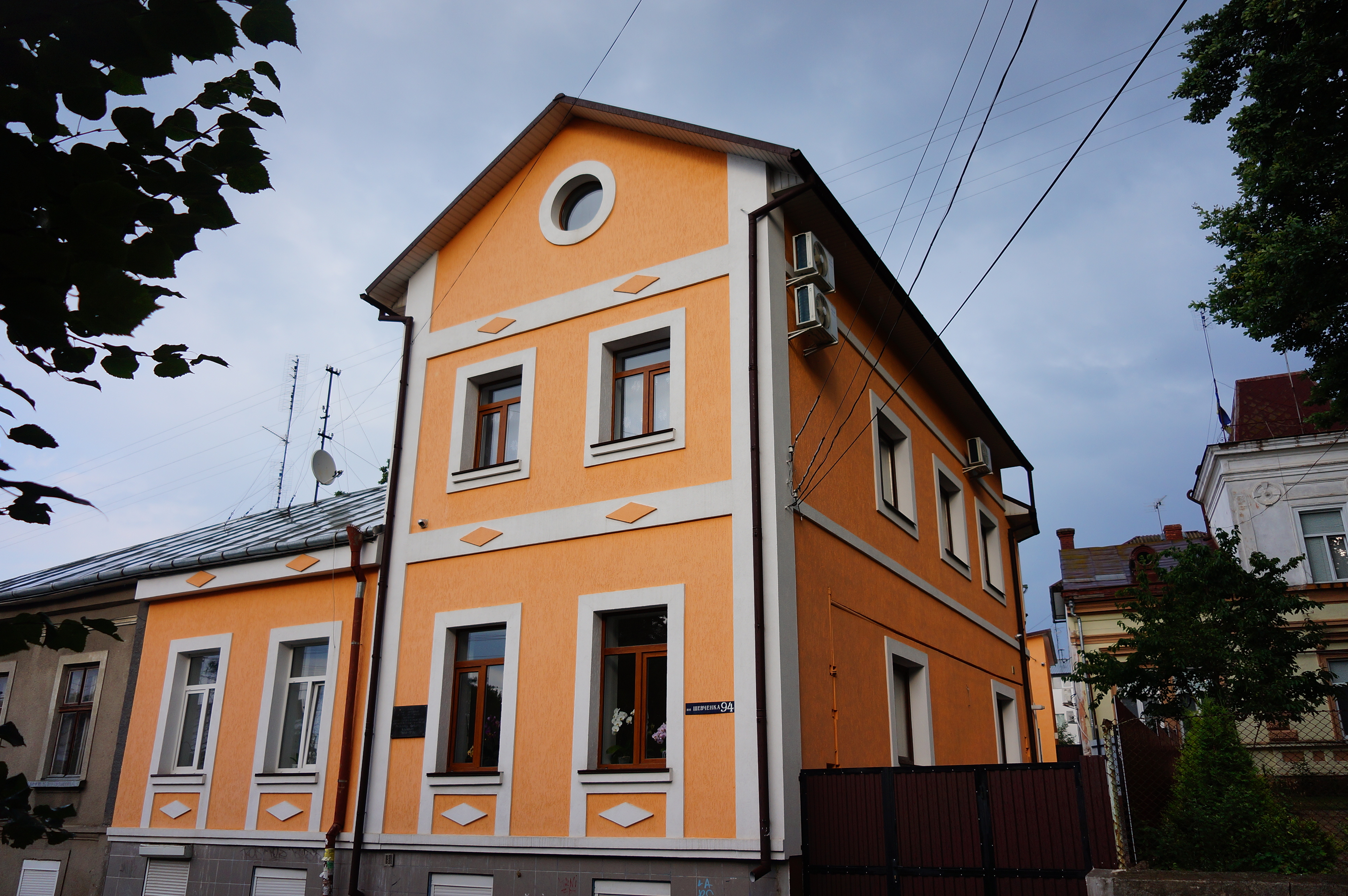 Будинок,в якому жив Кайндль Р.Ф.-вчений,історик,етнограф., Чернівці, вул.Шевченка,94